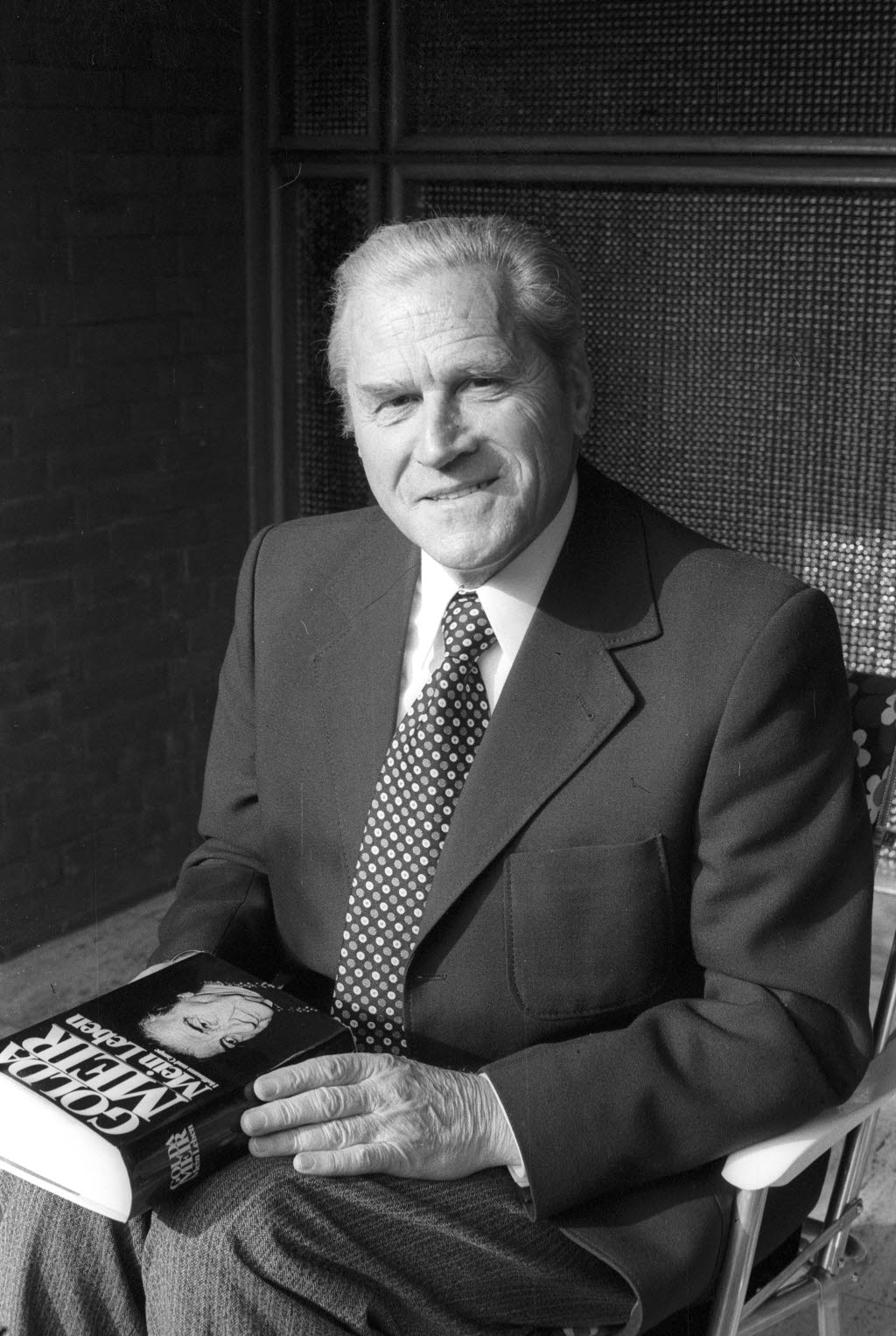 Der SPD-Kommunalpolitiker und ehemalige Stadtpräsident 1959-1970 feiert am 16.10.1976 seinen 65. Geburtstag.